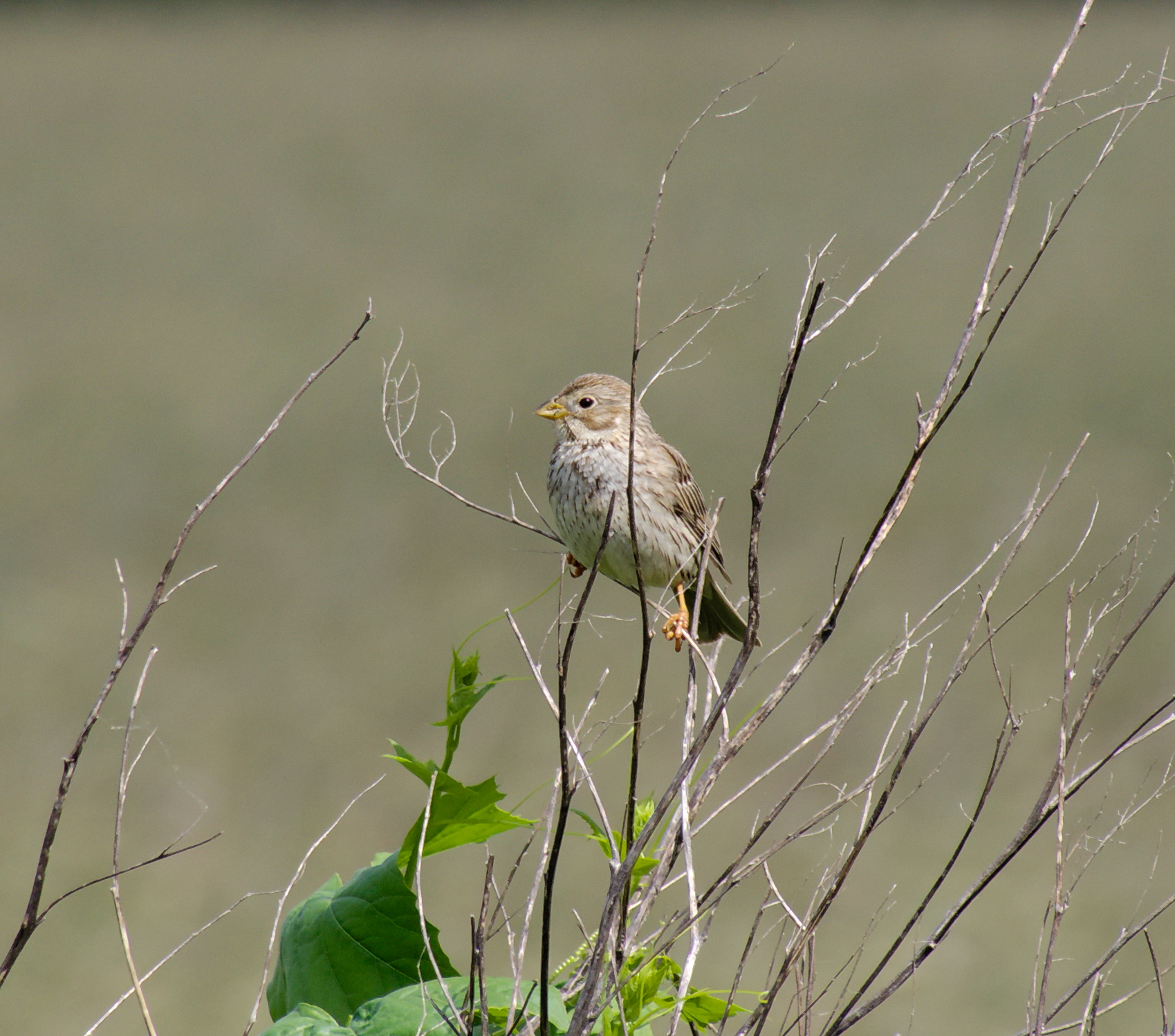 Grauammer - Emberiza calandra, Weibchen. Aufgenommen in Ahrensberg (Wesenberg), Mecklenburg-Vorpommern, Deutschland.